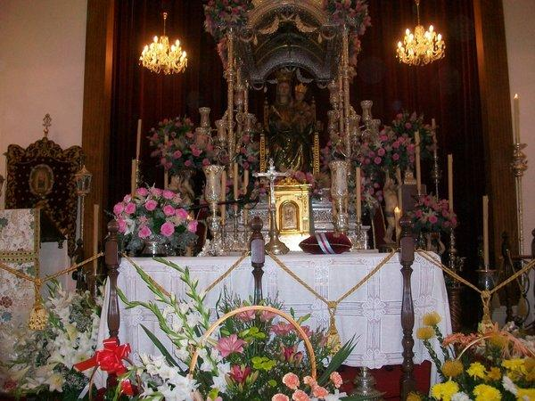 Nstra. Sra de la Bella en su ermita